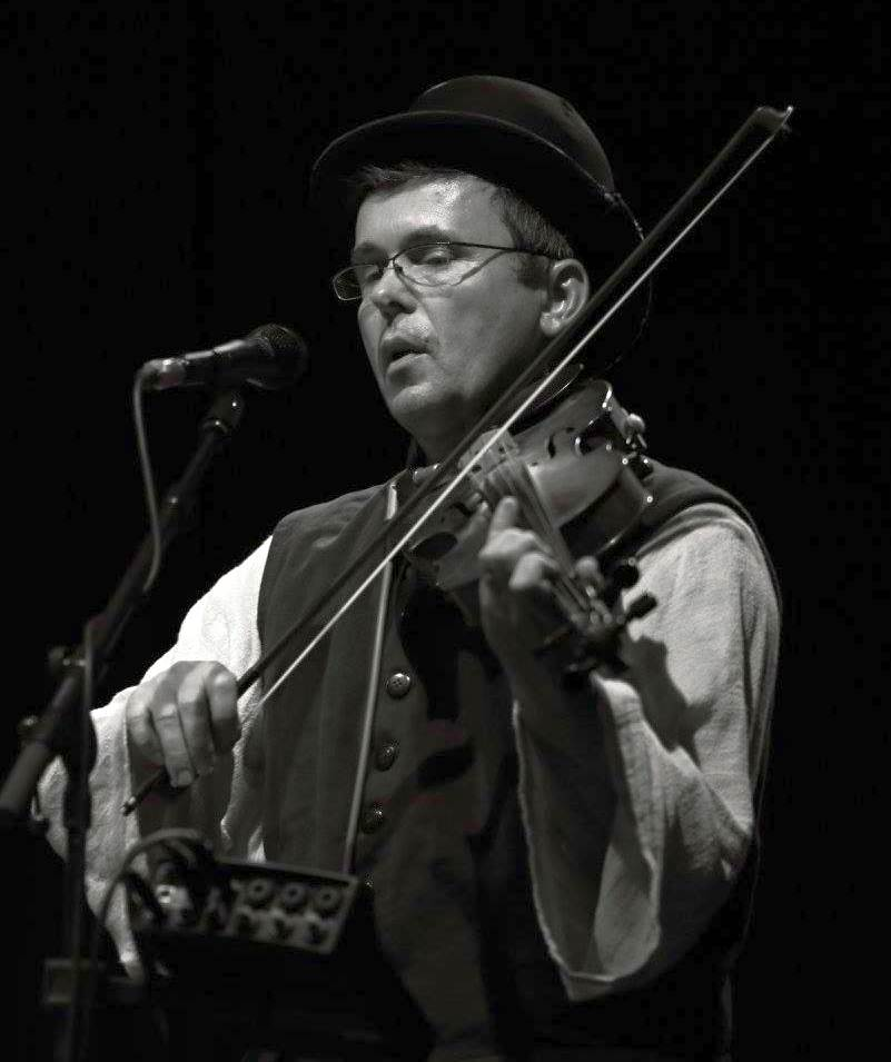 Vaňkovkafest 2016